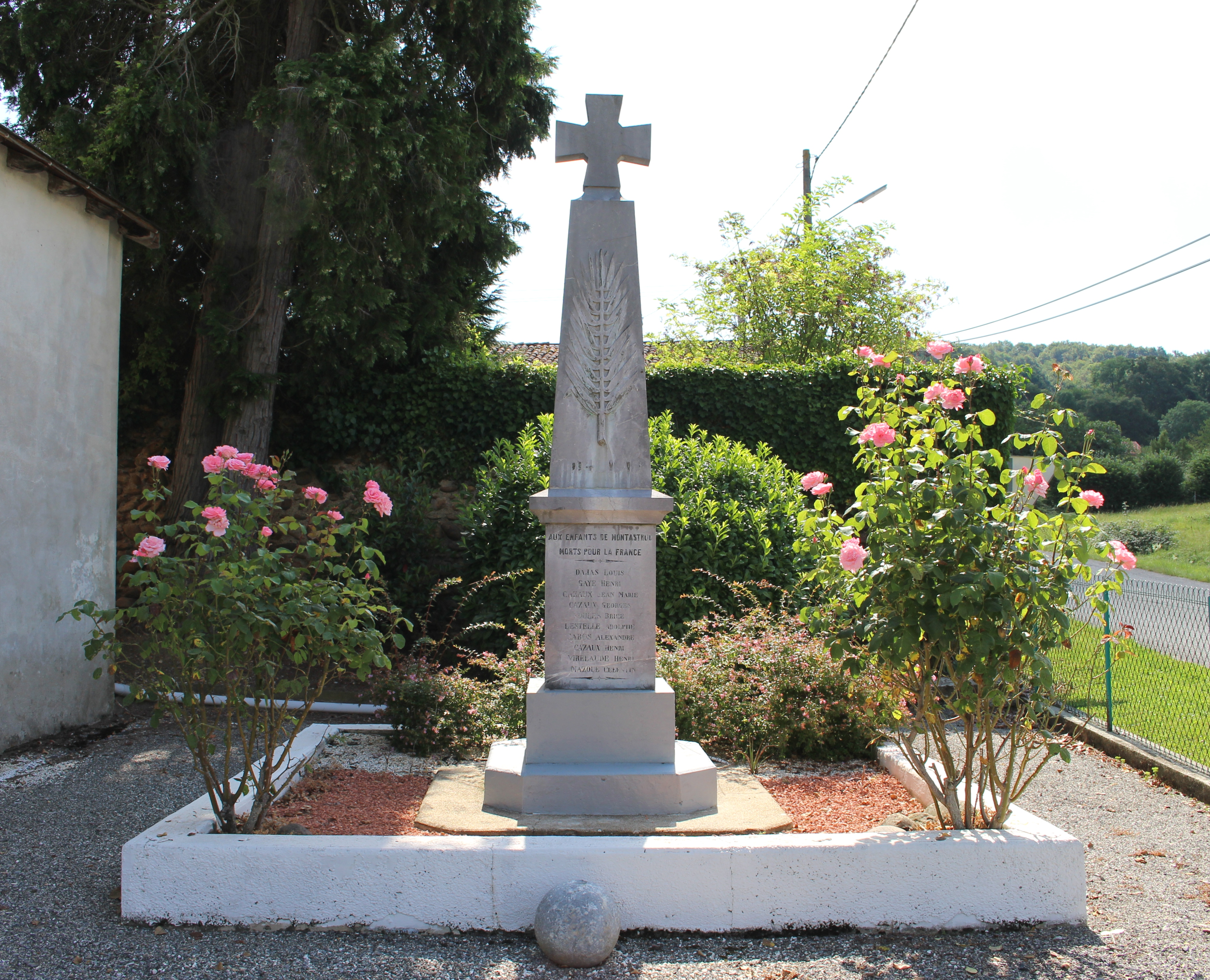 Monument aux morts de Montastruc (Hautes-Pyrénées)